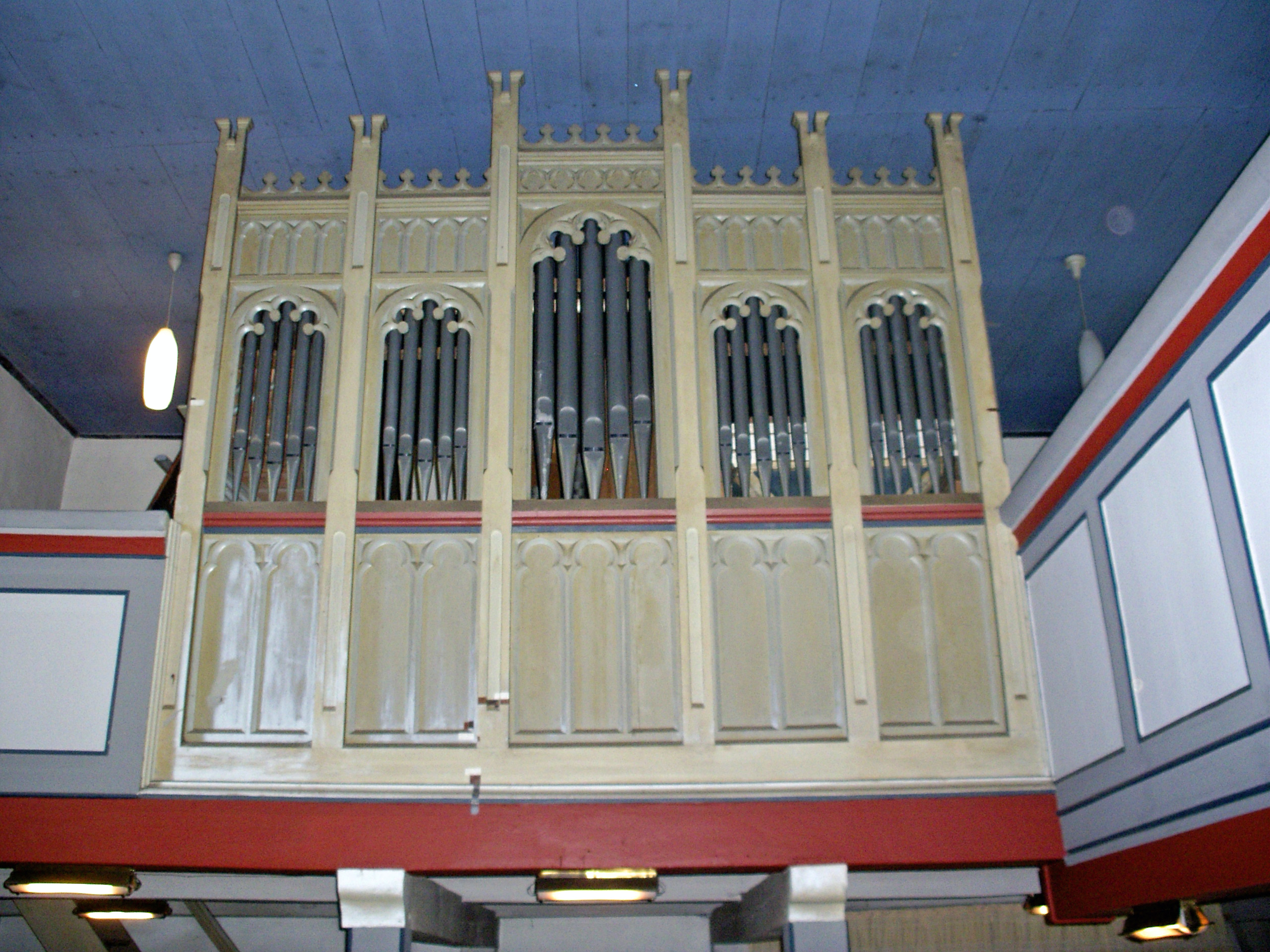 Orgel der St.-Petri-Kirche Horst Burweg, Landkreis Stade, Niedersachsen, Deutschland